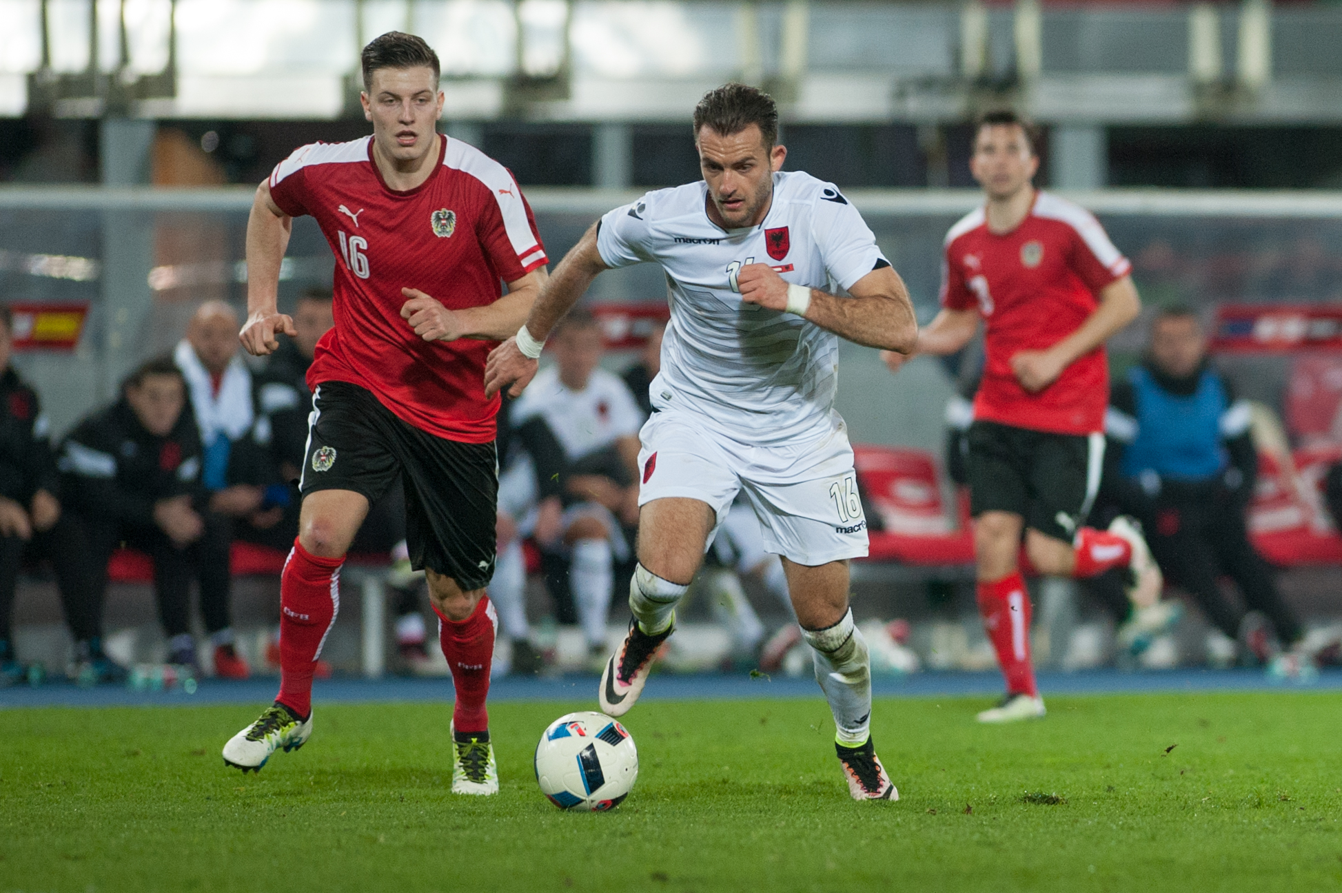 Wien, 26.03.2016, ÖFB Laenderspiel Oesterreich vs Albanien. Bild zeigt Kevin Wimmer (AUT) und Sokol Cikalleshi (ALB).